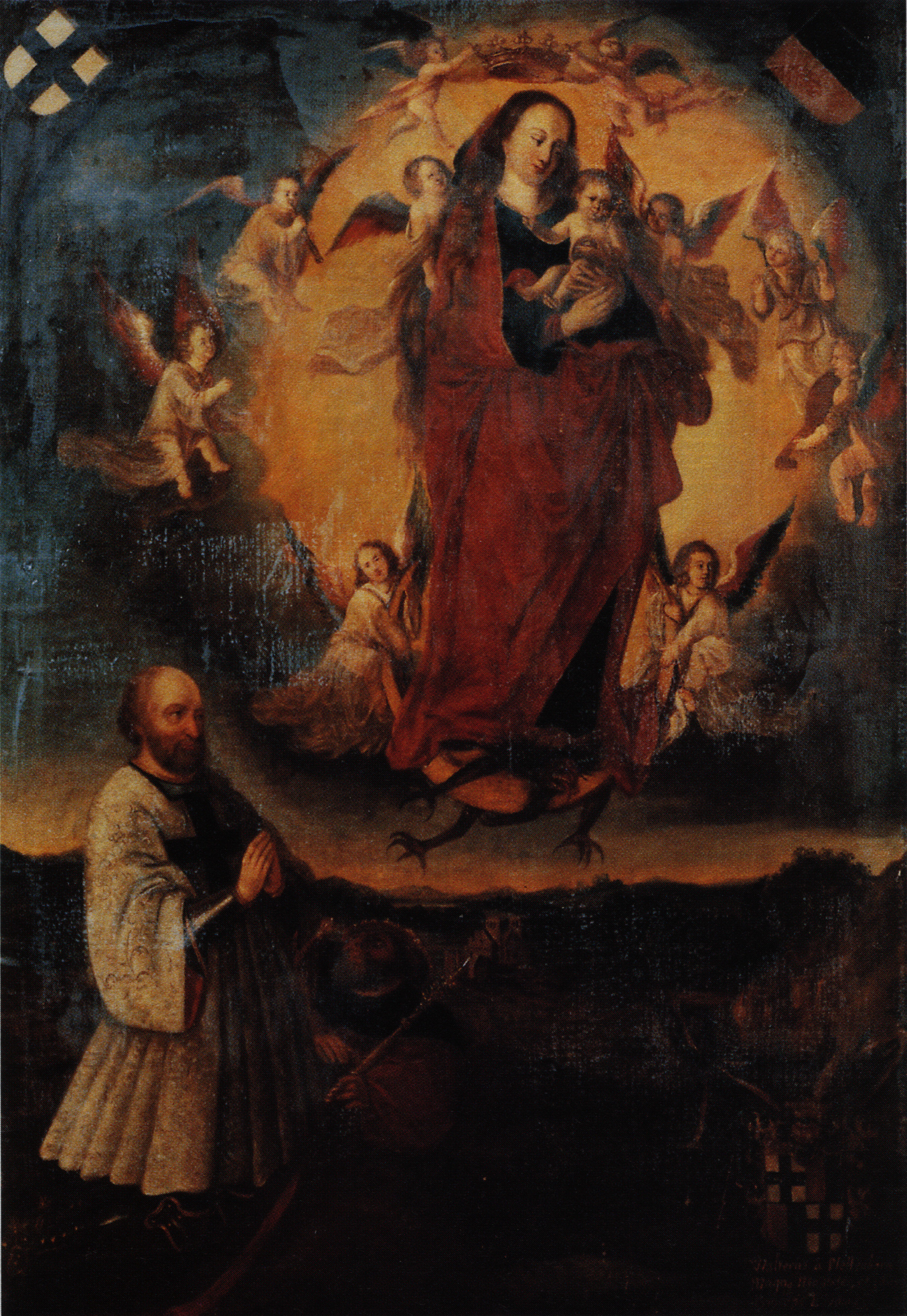 Votivbildnis anlässlich der gewonnenen Schlachten gegen den Grossfürsten von Moskau 1501/1502. Links kniend: Wolter von Plettenberg im Ornat eines geistlichen Ritters; daneben kauernd der Besiegte mit Szepter: Ivan III. Wohl Kopie des 18. Jahrhunderts (Öl auf Leinwans: 95 x 135 cm) nach einem in Livland entstandenen Original. Standort: Schloss Hovestadt bei Soest in Westfalen.